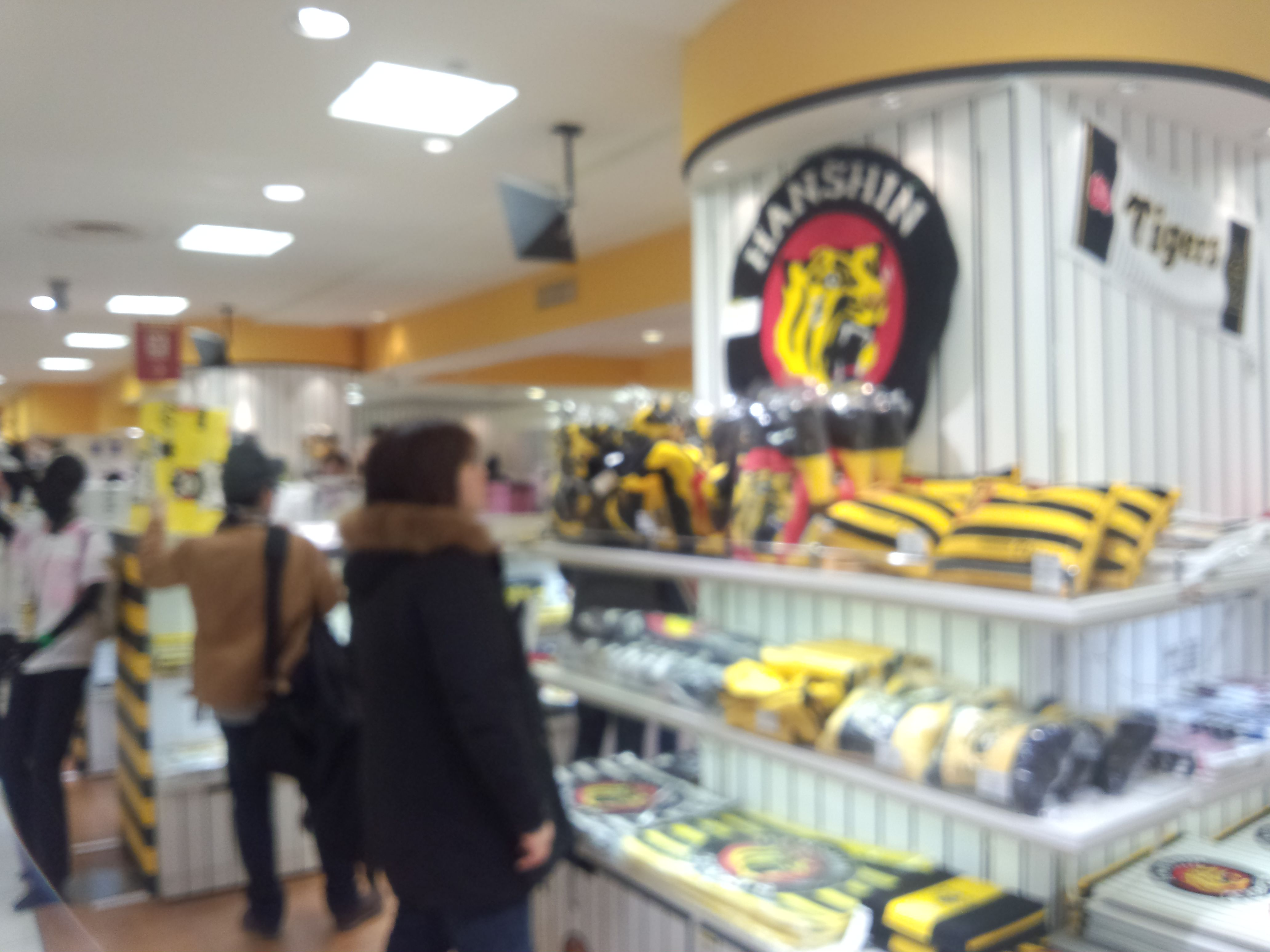 大阪梅田の阪神百貨店梅田本店8階にある、阪神タイガースショップ